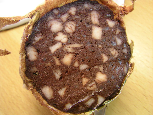 frisch angeschnittene Beutelwurst